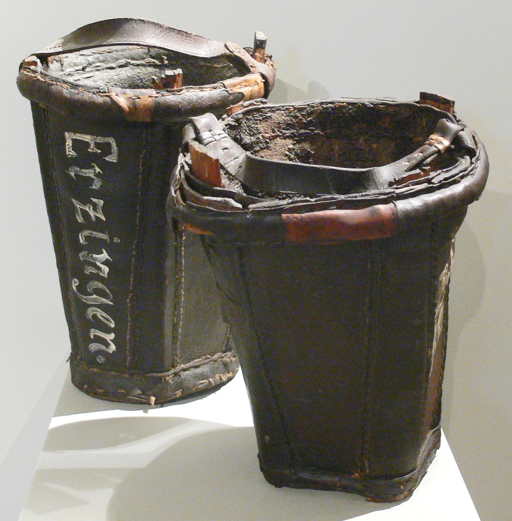 Zwei Feuerlöscheimer aus Erzingen (heute zu Balingen), 19. Jh., Leder und Nadelholz Landesmuseum Württemberg (Außenstelle: Museum für Volkskultur Waldenbuch), E.4, Inv. Nr. VK 1988/570 + VK 1988/571